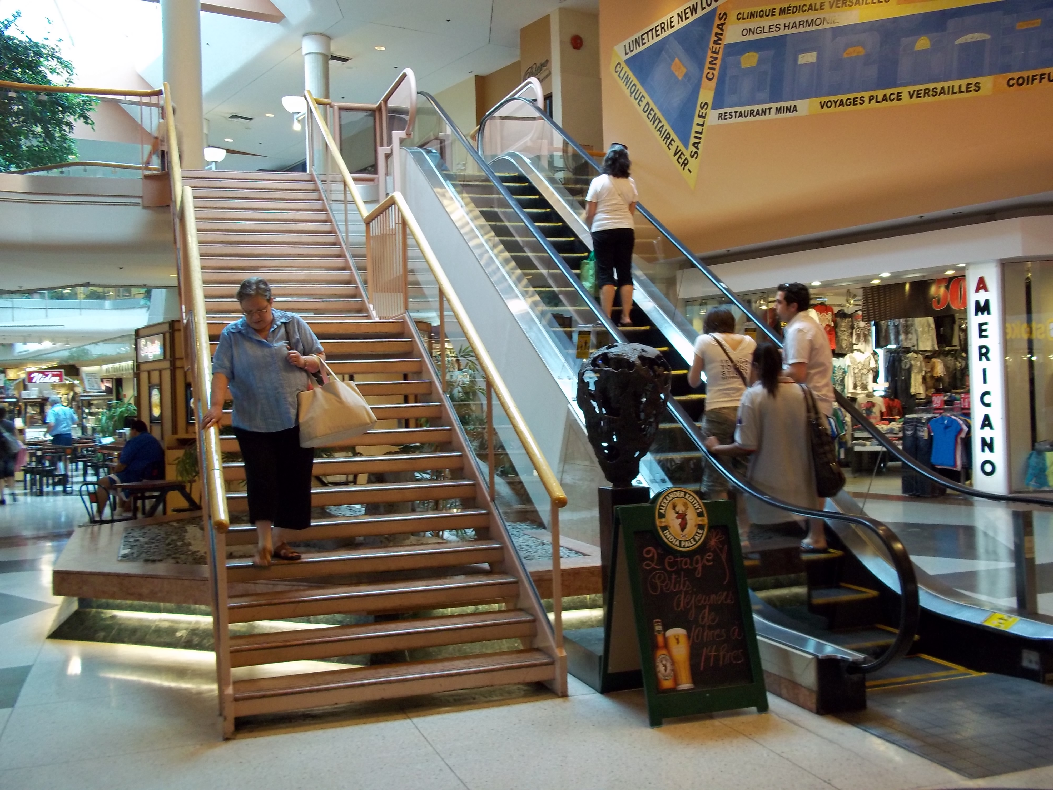 Place Versailles, Montréal